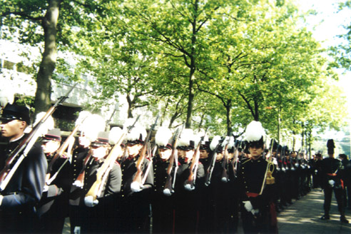 KSS op het binnenhof